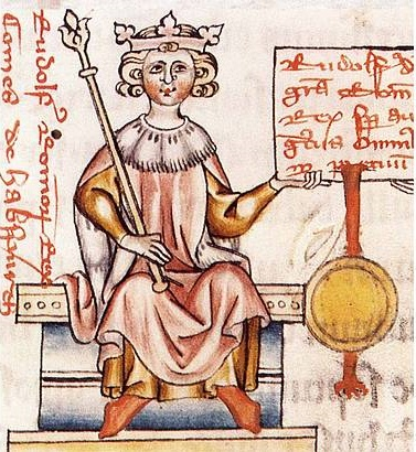 Rudolf von Habsburg